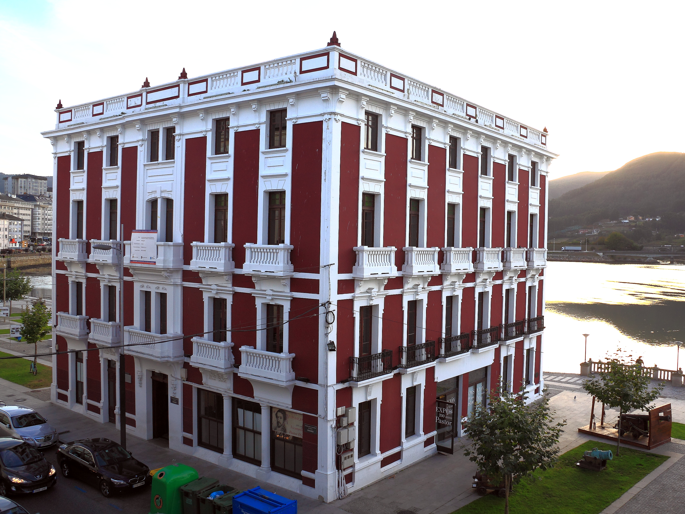 Viveiro (Lugo) - Antiguo Hotel Venecia - Actualmente alberga varios servicios municipales como el conservatorio de música o una pequeña sala de exposiciones.